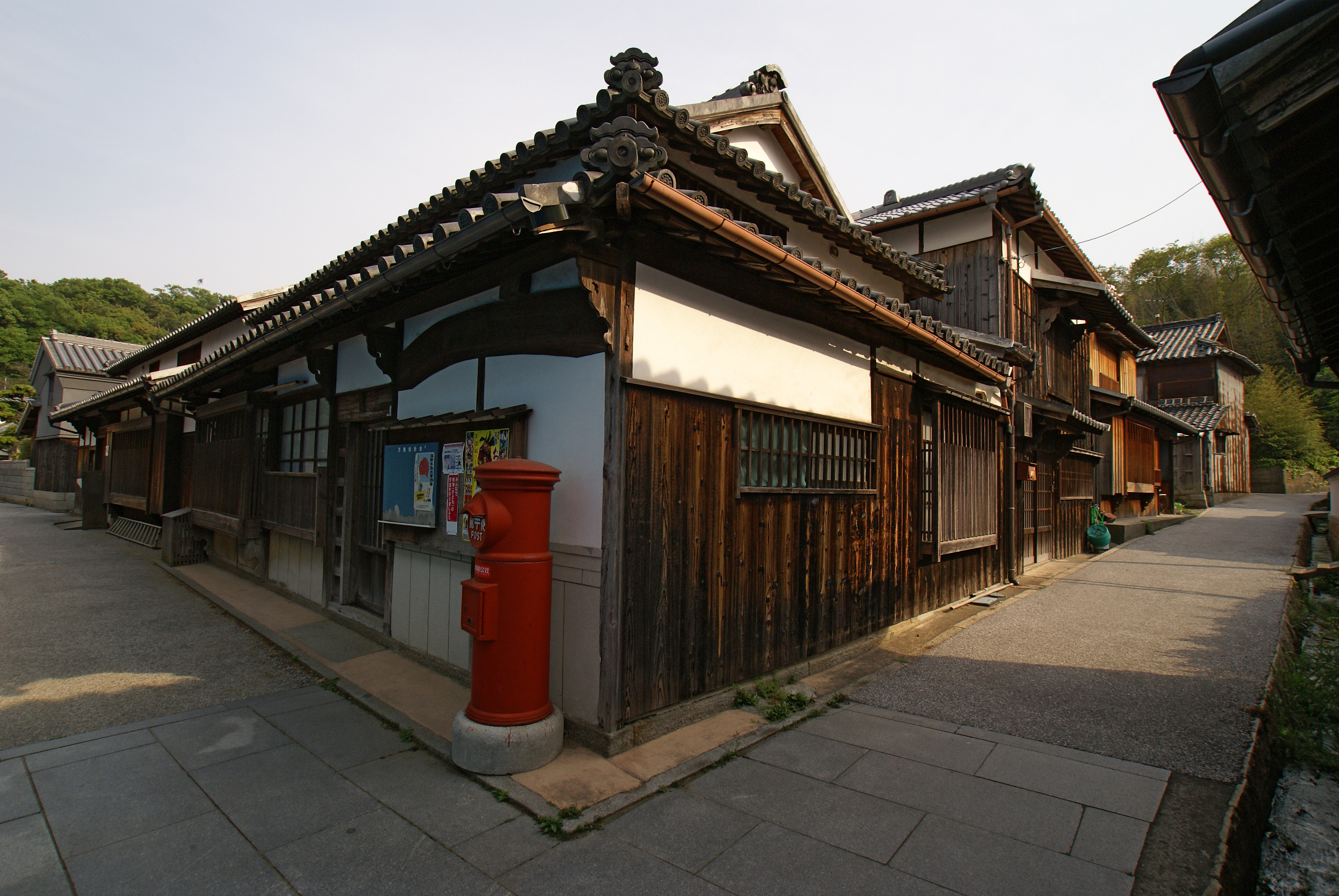 Kasajima, Hon-jima of Shiwaku Islands (Marugame, Kagawa prefecture, Japan)